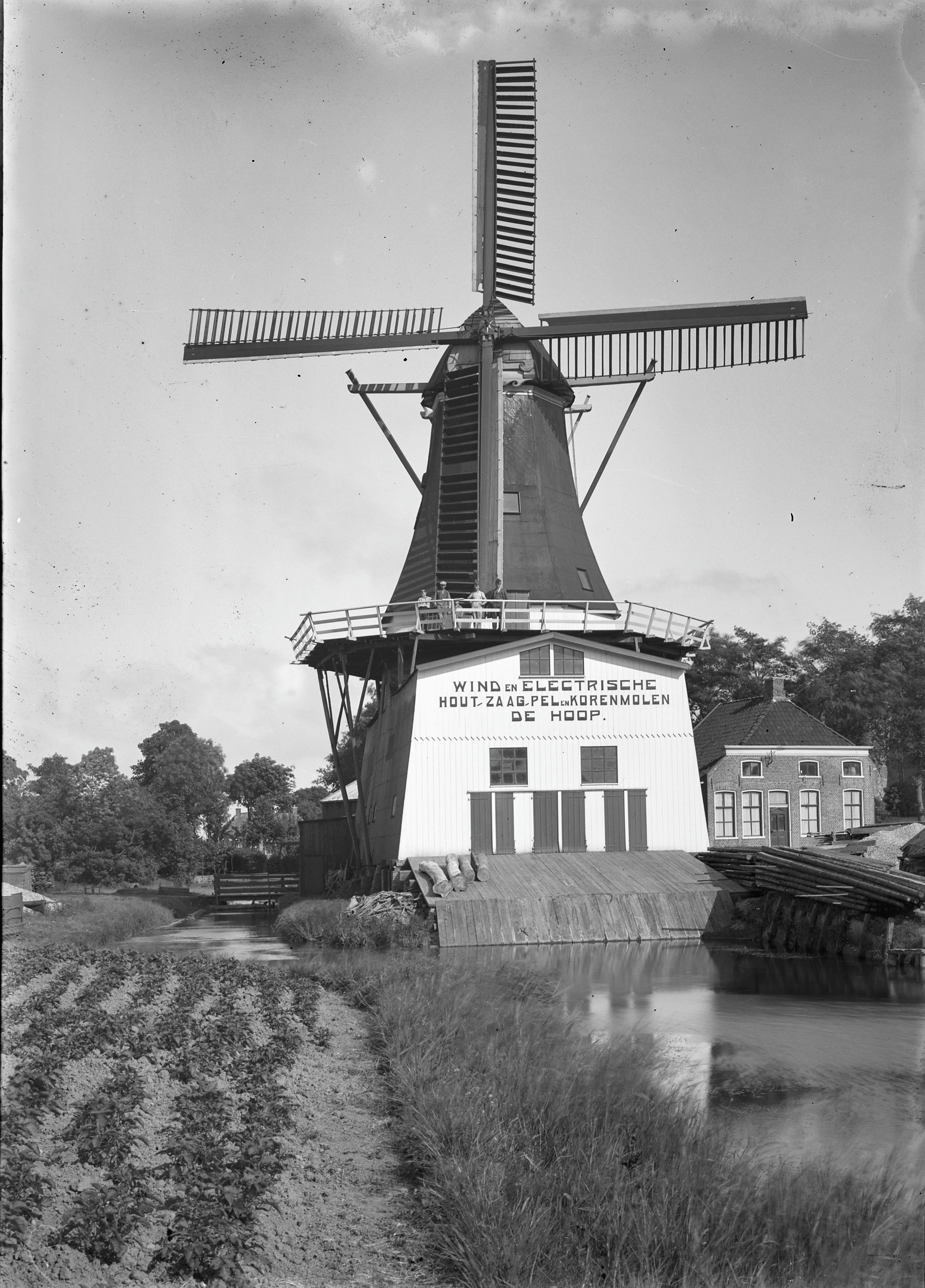 Diversen: Molen